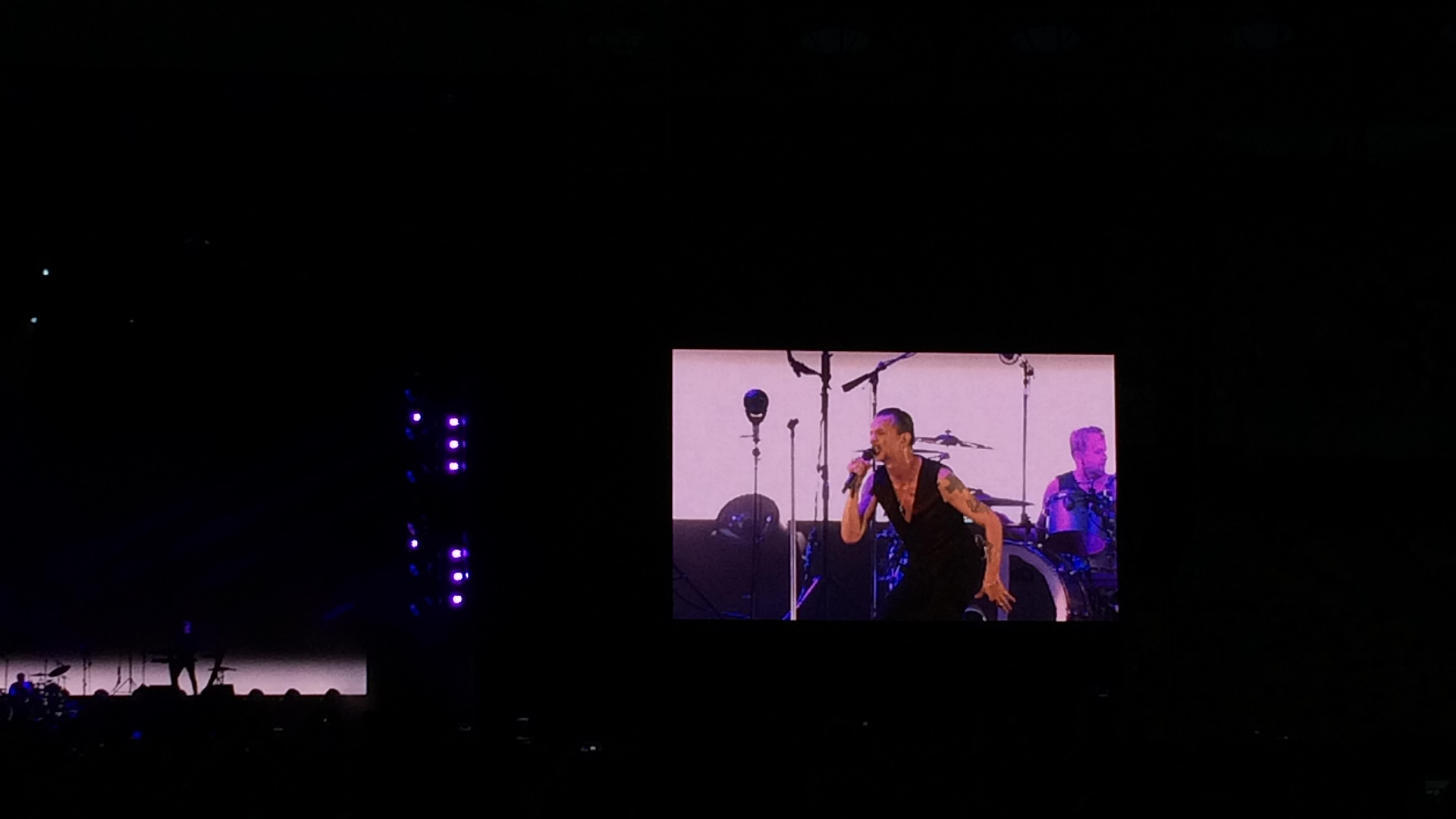 Концерт гурту Depeche Mode в Києві на стадіоні НСК Олімпійський, 19 липня 2017 року